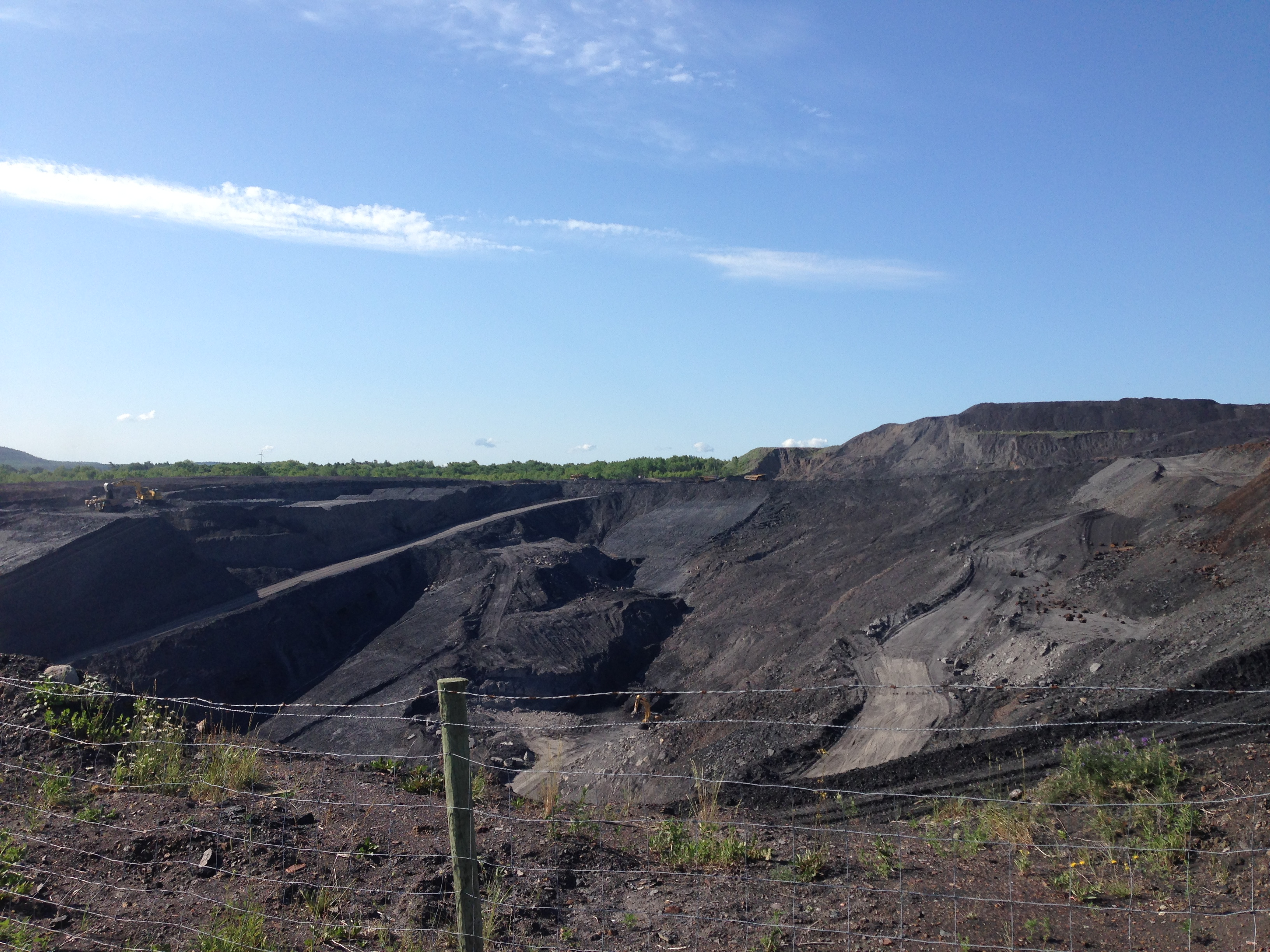 Pioneer Coal Mine (Stellarton, NS)